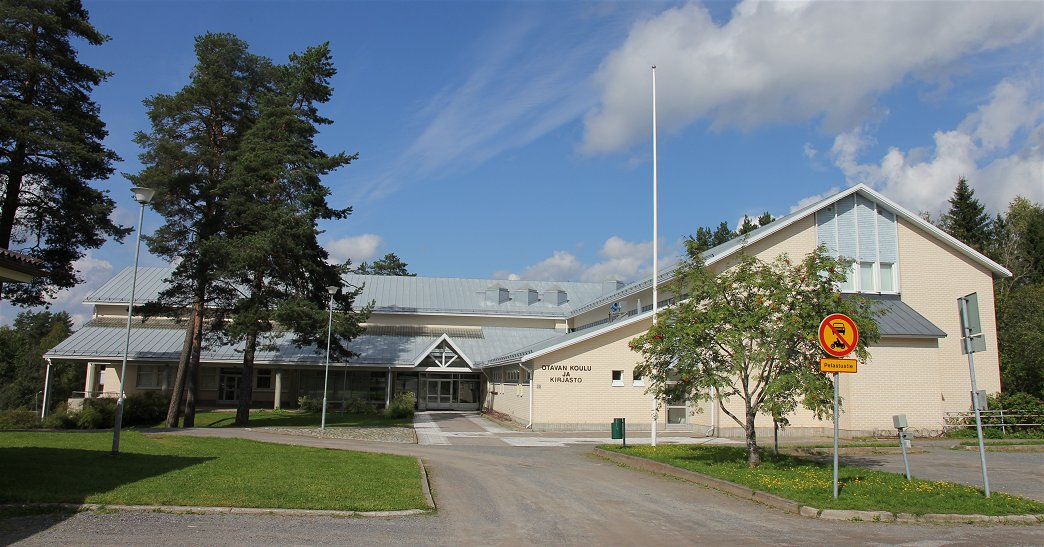 Otavan koulu (ala-aste) ja kirjasto Mikkelin Otavan taajamassa.